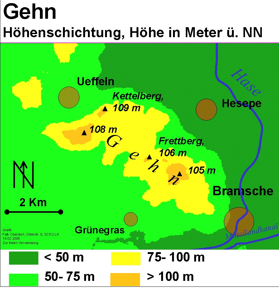 physische Karte des Gehn